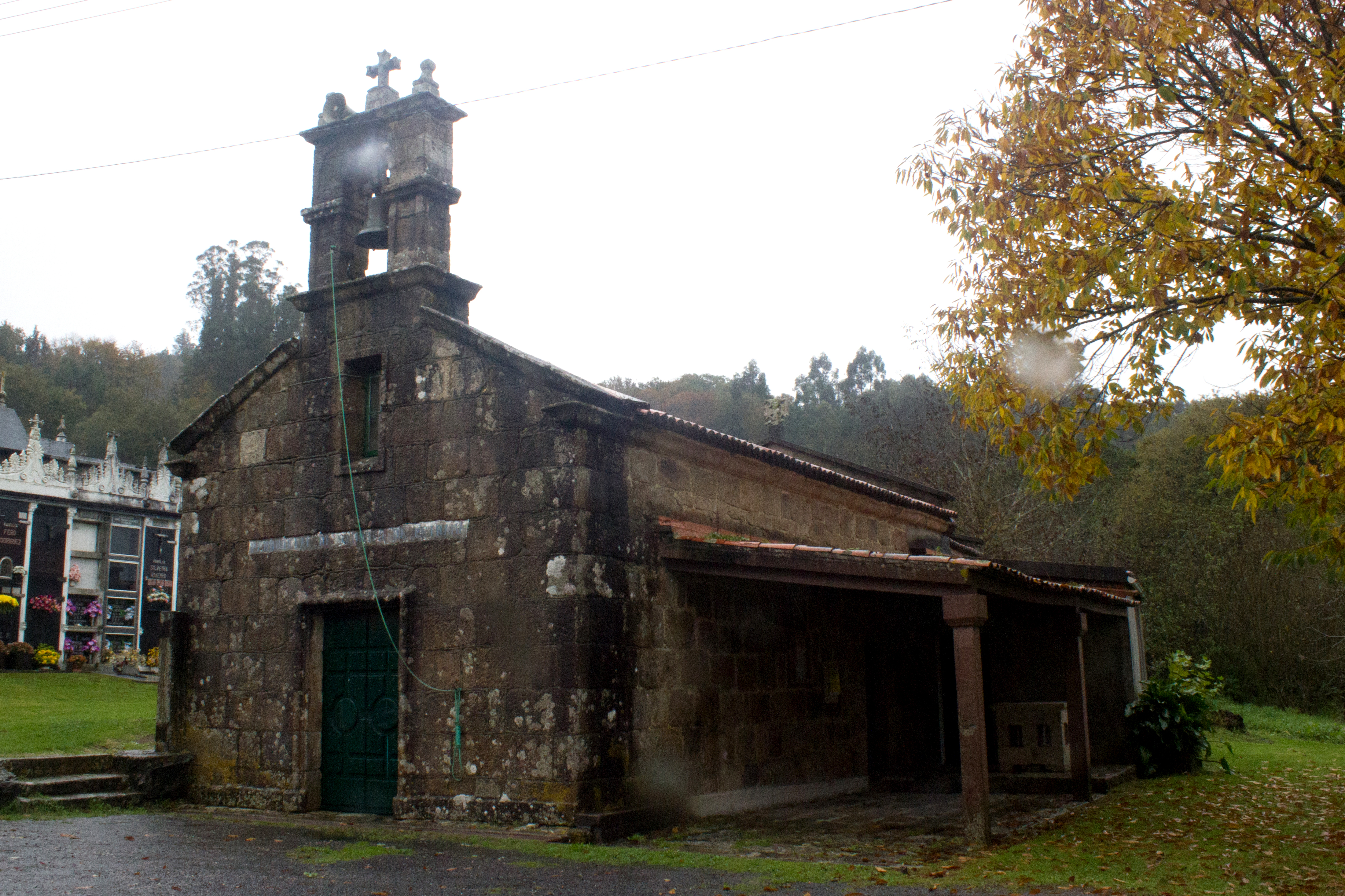 Igrexa de Santo André de Meirama, no concello de Cerceda.